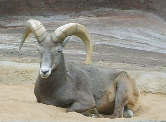 picture of dikhoornschaap